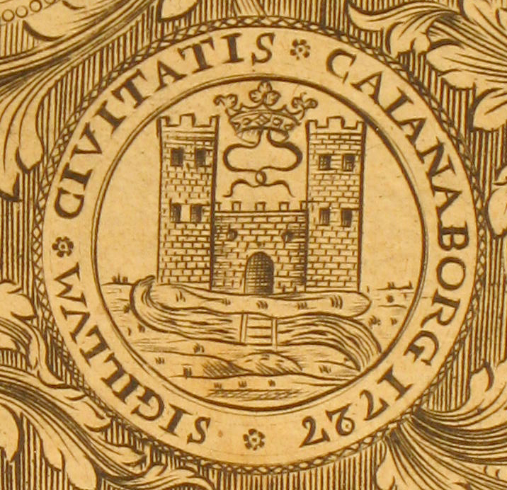 Kajaanin kaupungin sinetti 1700-luvulta (teoksesta: Petrus Mathesius, Dissertatio geographica de Ostrobotnia, Upsala 1734).